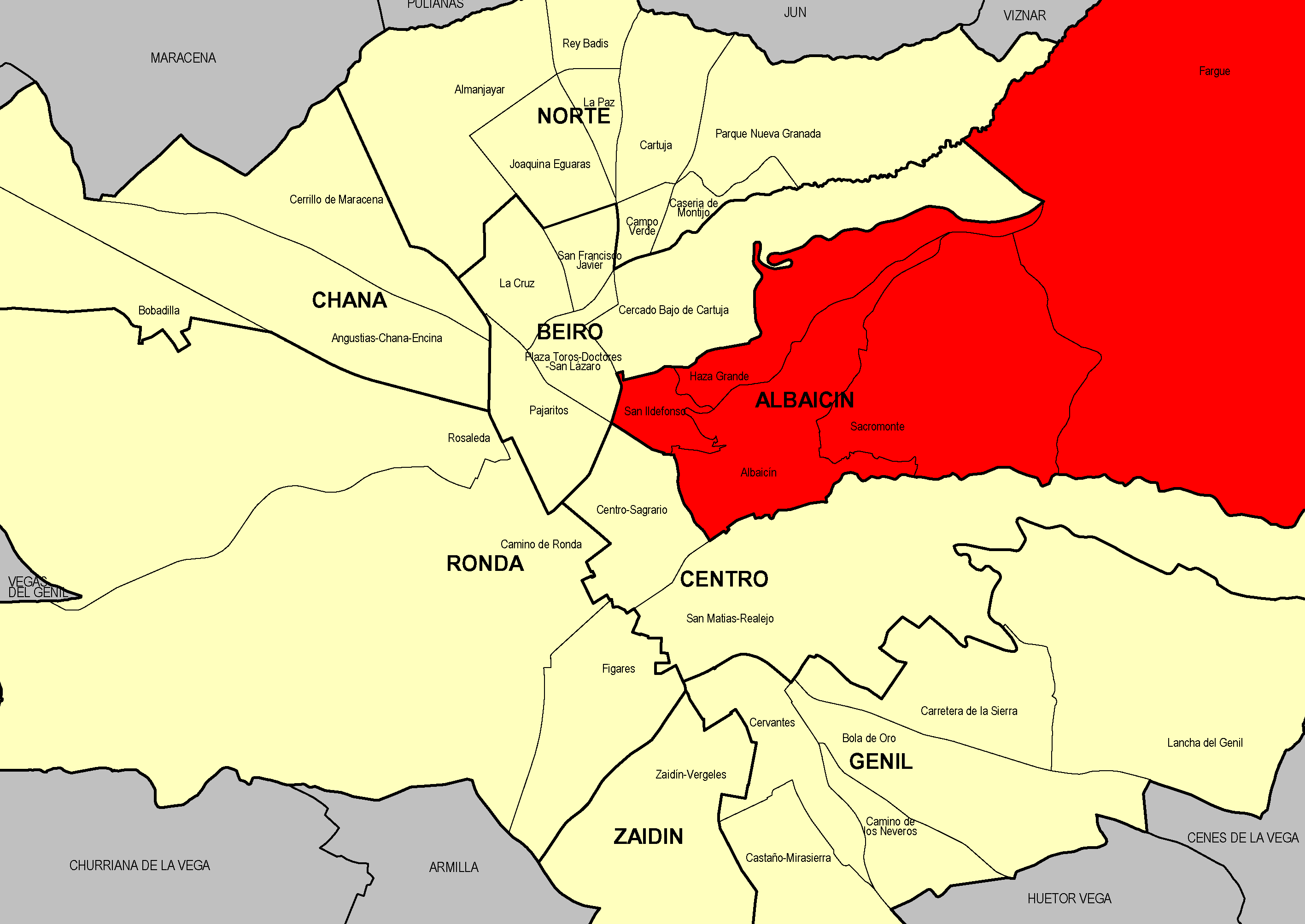 Distrito Albaicín, en el municipio de Granada (Granada, España)